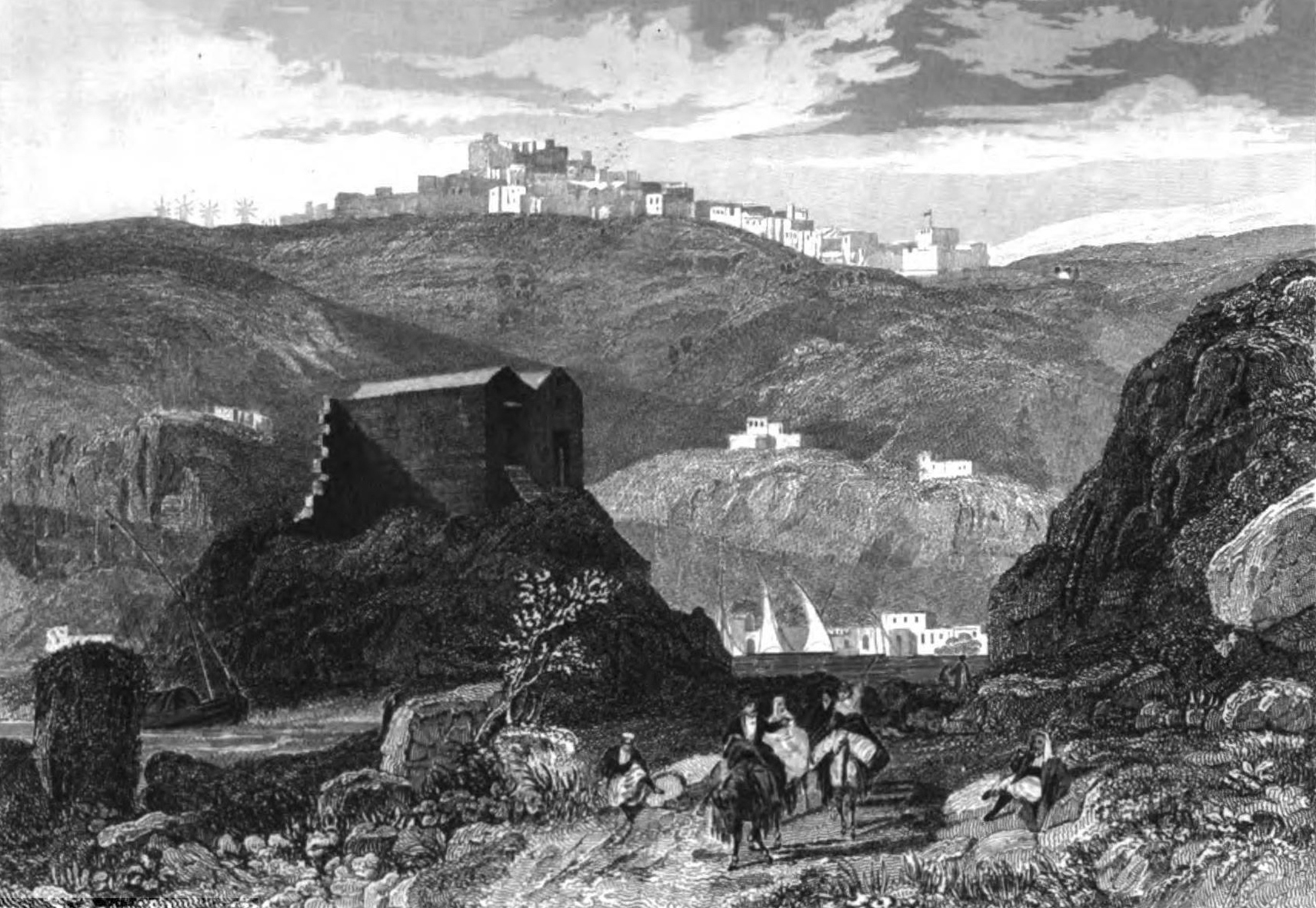 Patmos